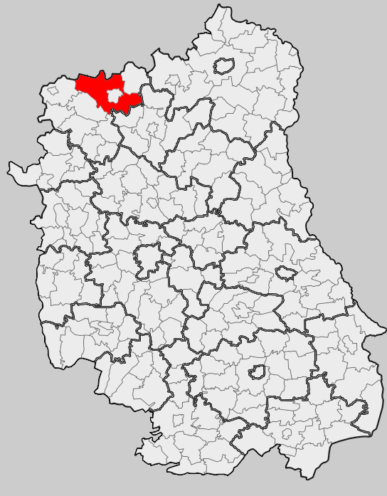 Map of gmina Łuków (rural), Łuków county, Lublin voivodship Mapa gminy Łuków (wiejska), powiat łukowski, województwo lubelskie